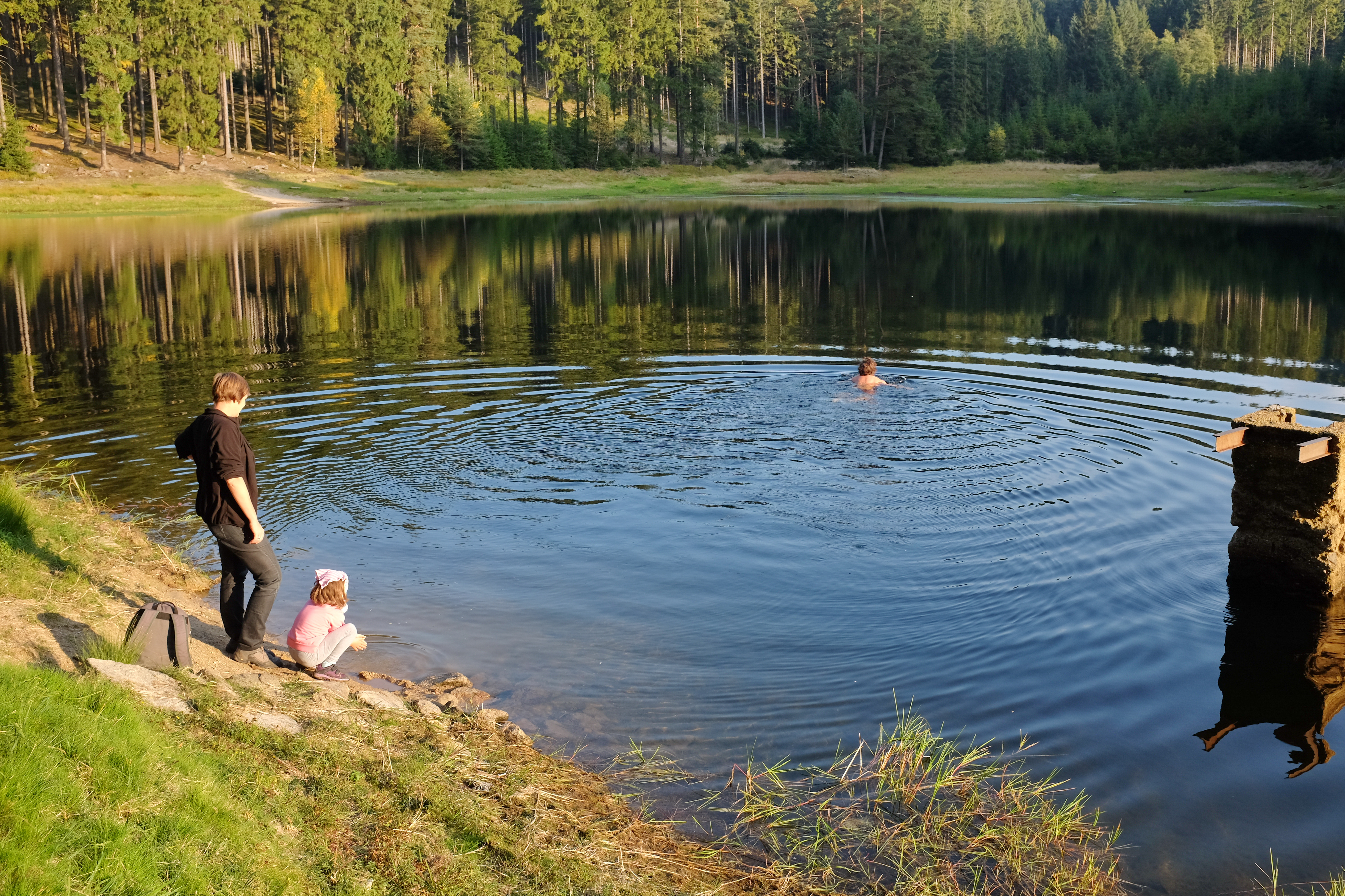 Přírodní památka Na Vážkách, Nový rybník (známý též pod jménem "Dolní Komáří rybník"), Slavkovský les, okres Sokolov